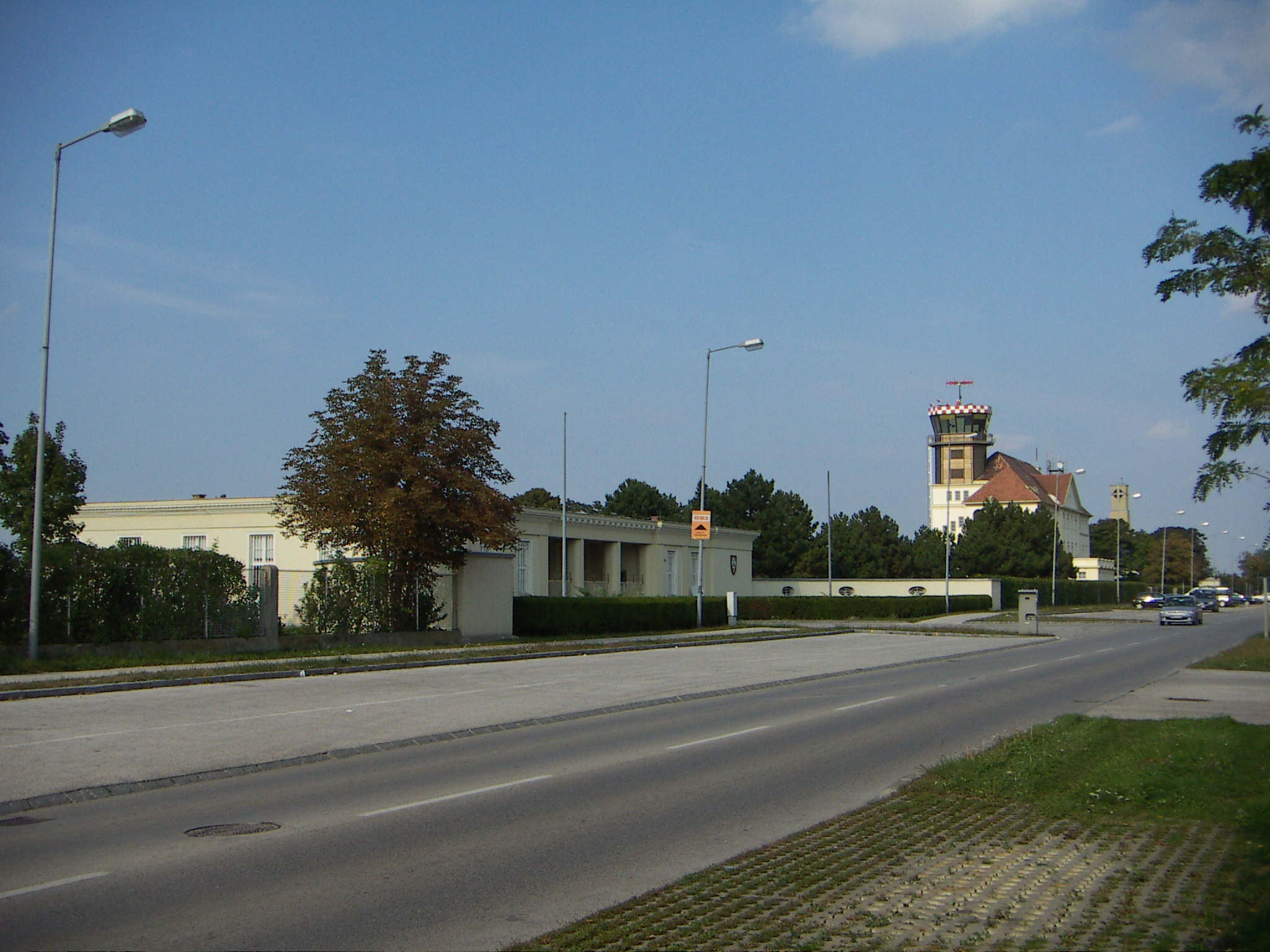 Fliegerkaserne, vorne Portalbau, Offiziers-Wohngebäude, hinten Kirchturm von St. Anton am Flugfeld, ehemals Kamin des Zentralheizungskesselhauses